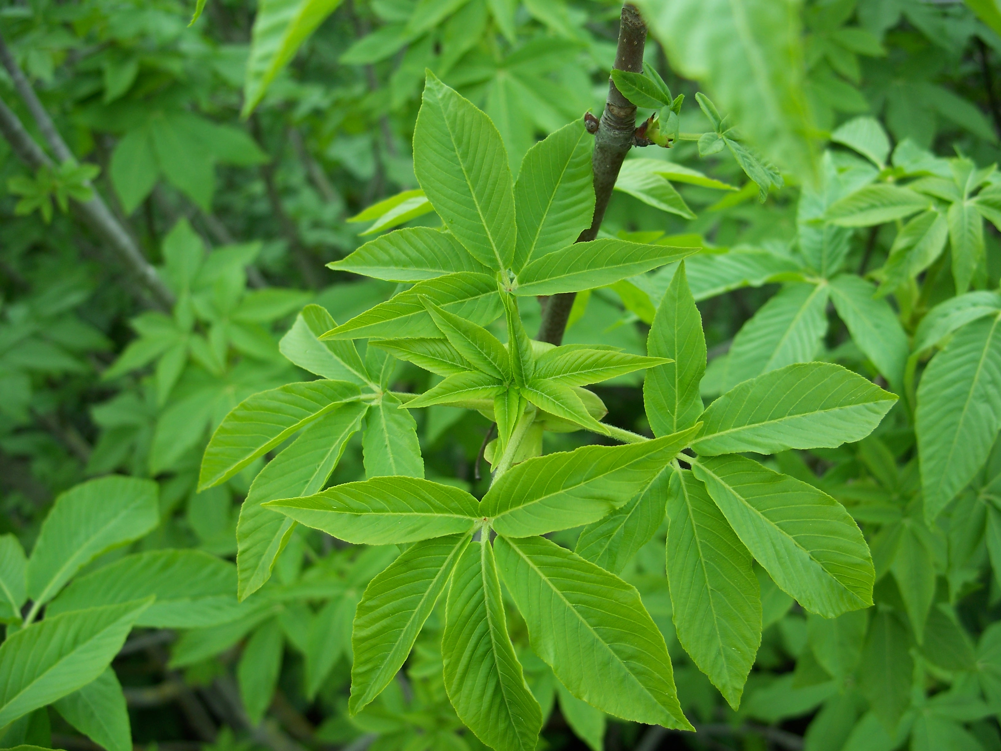 Aesculus californica Made in San Jose, California. Identified by Franz Xaver.